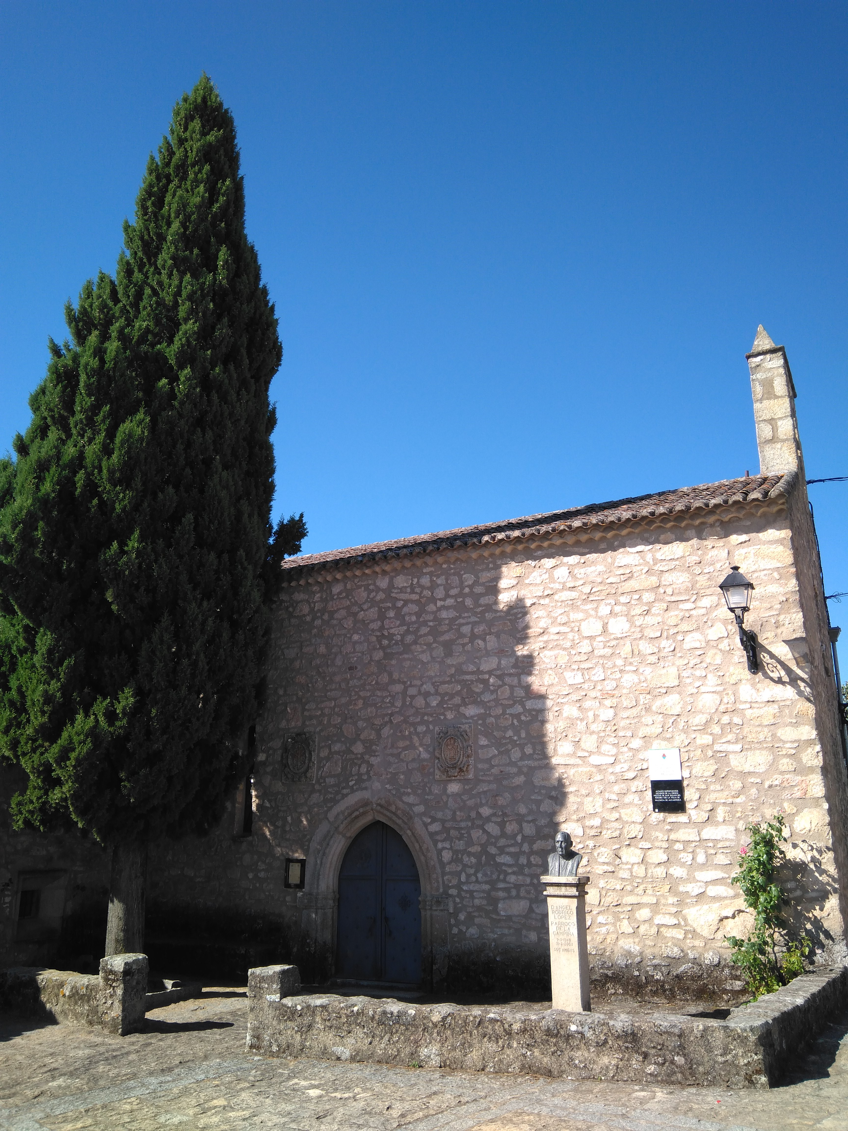 Convento ubicado en San Pedro de los Majarretes, entidad singular de población del municipio español de Valencia de Alcántara, en Cáceres en el que San Pedro de Alcántara hizo el noviciado y tomó los hábitos de la orden franciscana.